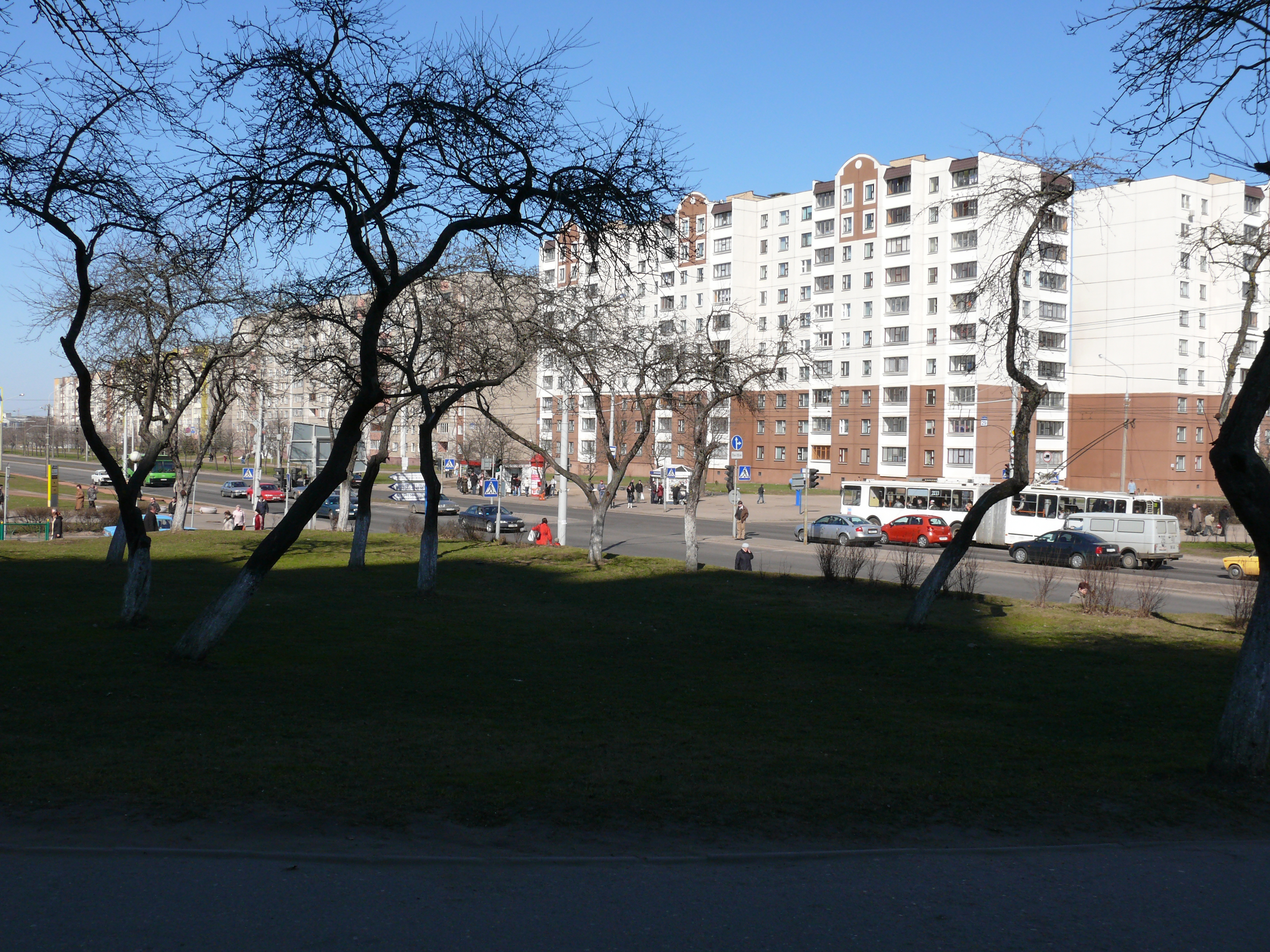 پښتو: Minsk Belaruss